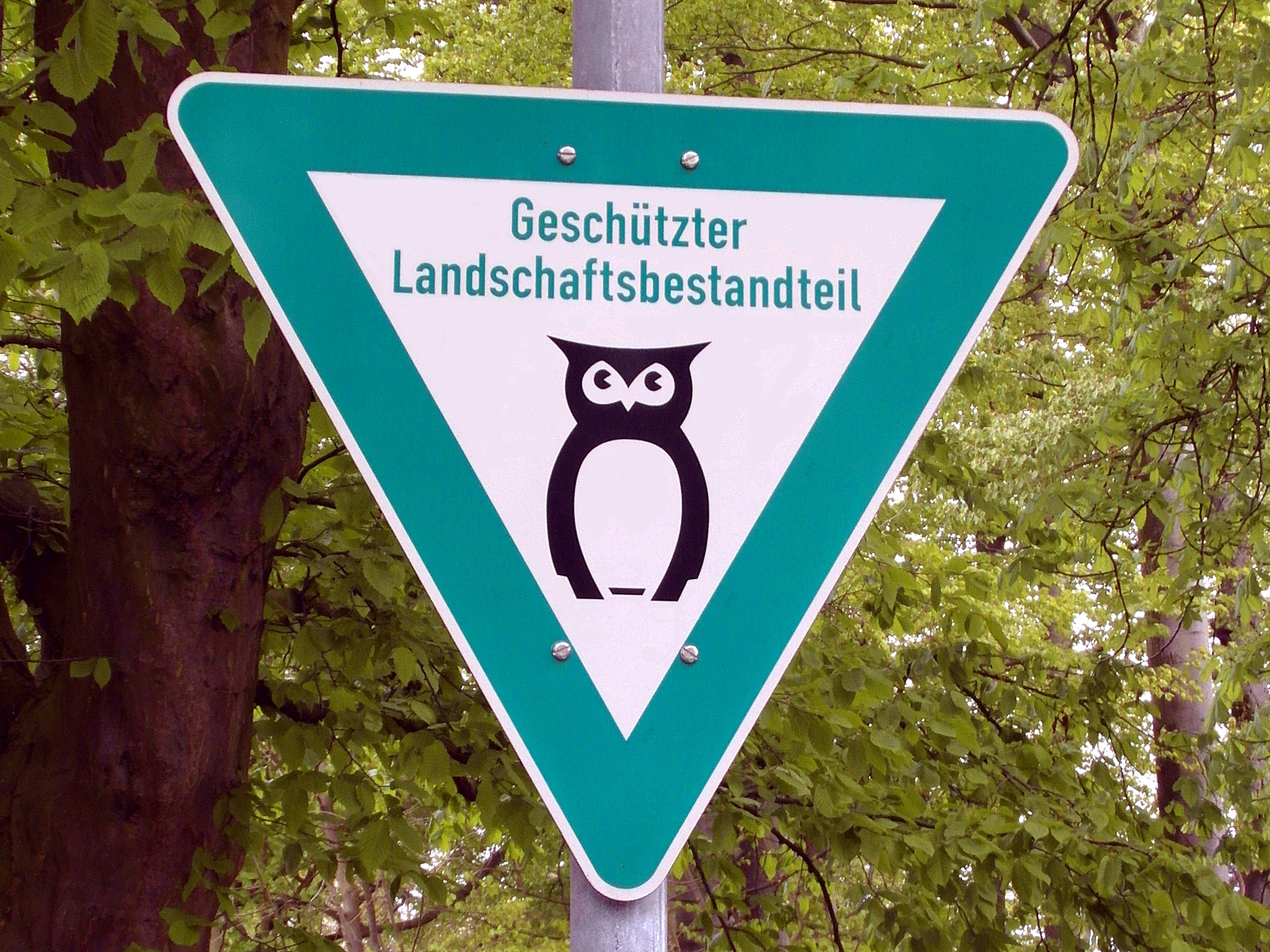 Hinweisschild am Rand des geschützten Landschaftsbestandteils Ahlemer Holz in Hannover.